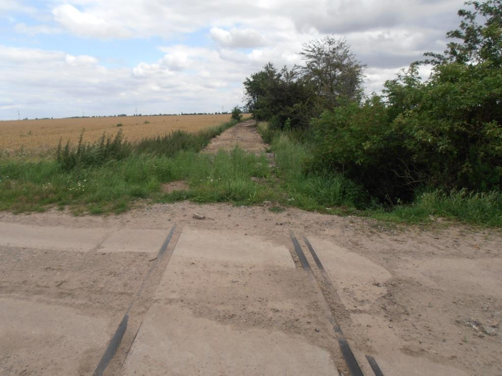 Bahnstrecke Schönebeck–Blumenberg, Gleisbett mit Schienenreststück an einem ehemaligen Bahnübergang zwischen Welsleben und Bahrendorf